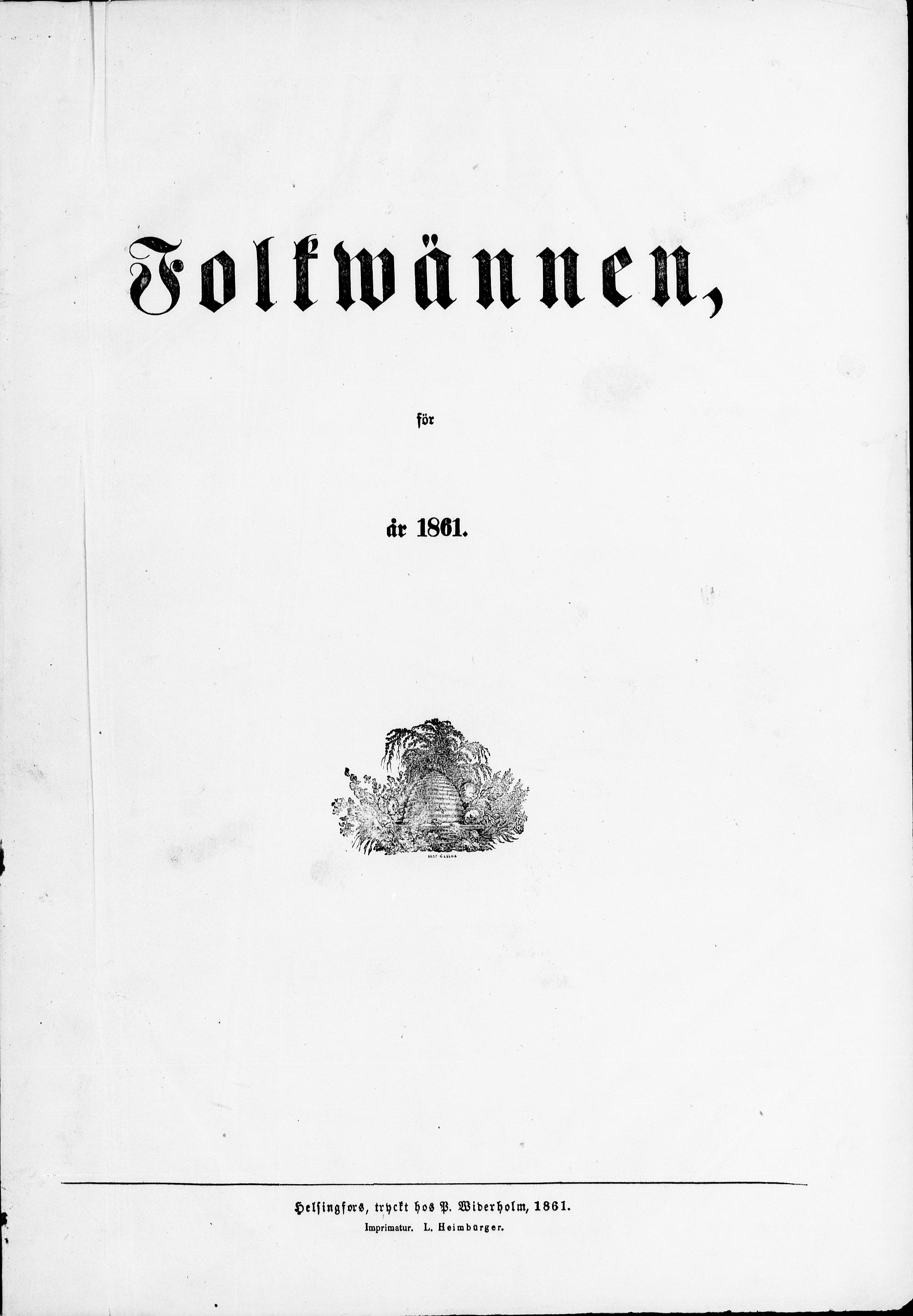 Första numret av Folwännen